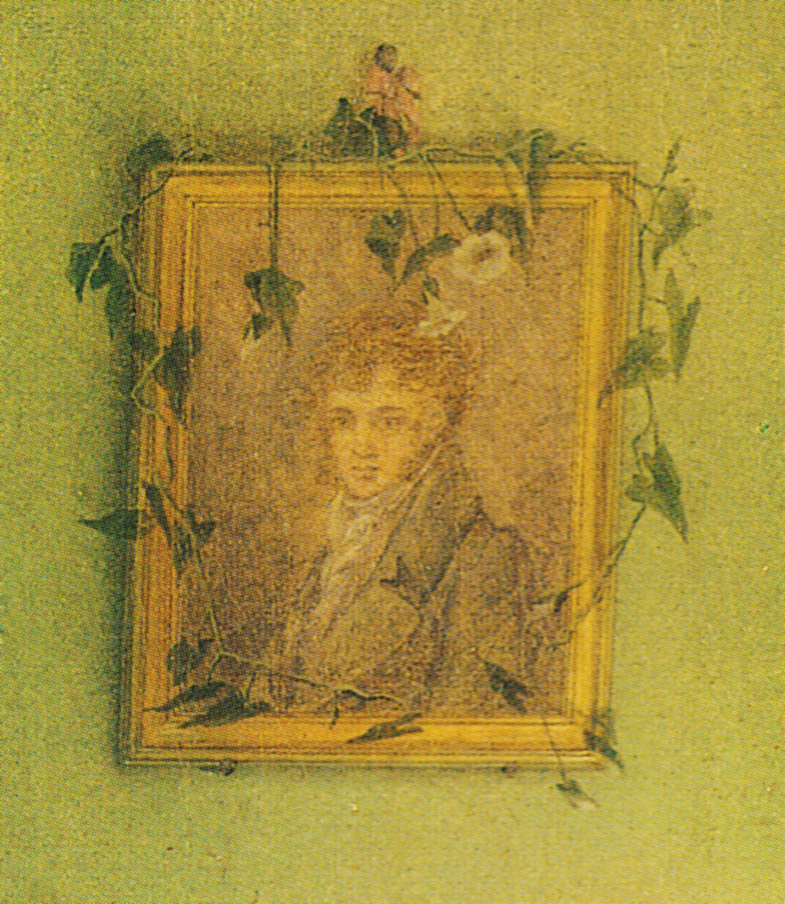 Erste Fassung 1812. Dargestellt ist Louise Seidler. Detail.